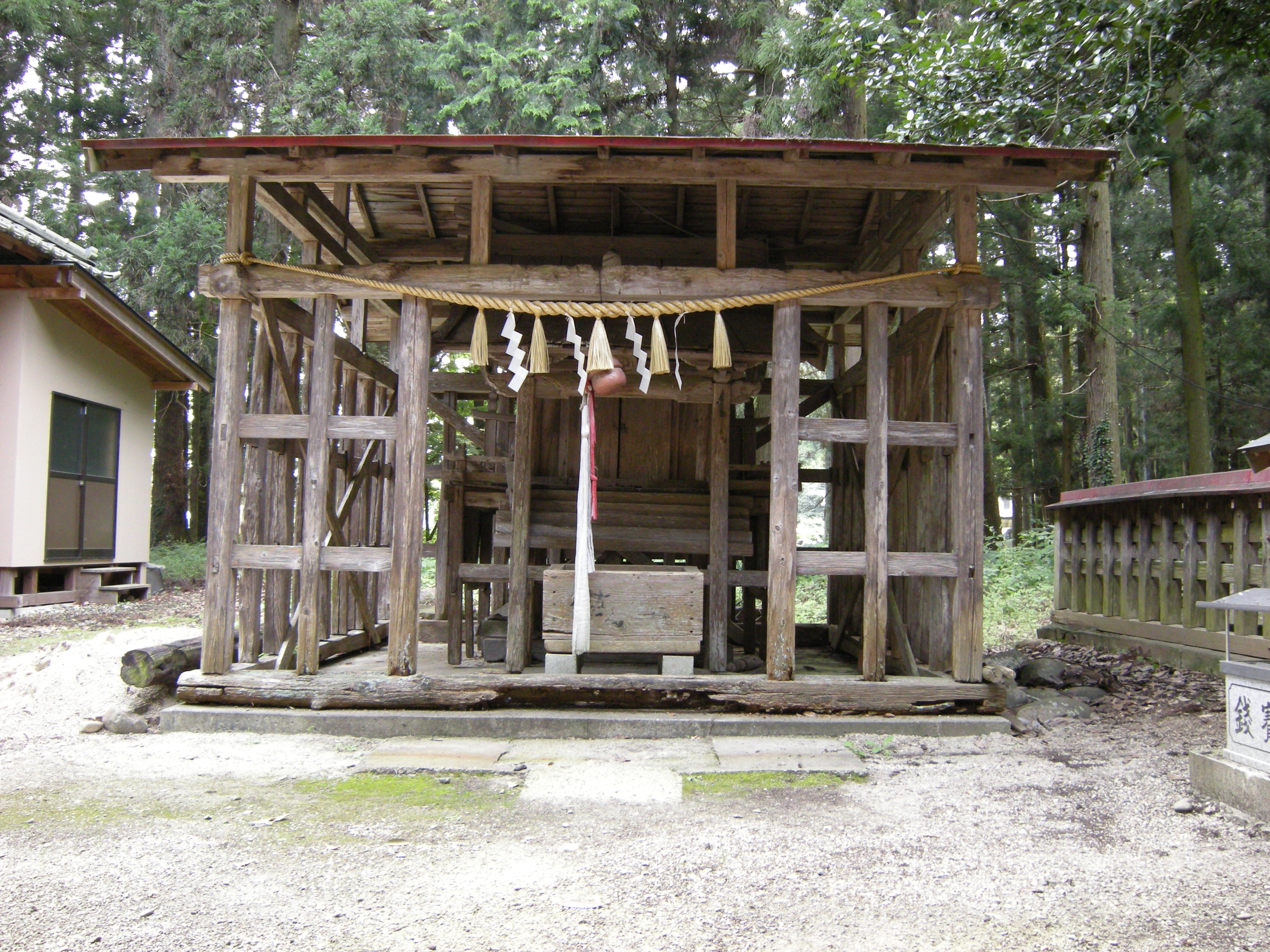 宮城県仙台市泉区の八咫烏神社（やたがらすじんじゃ）。賀茂神社の境内にある。西南西に向かって撮影。